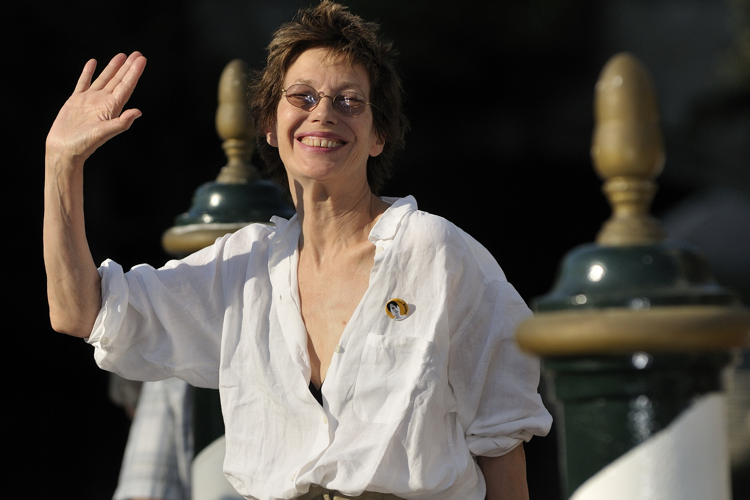 66ème Festival du Cinéma de Venise (Mostra), 6ème jour (07/09/2009) Jane Birkin